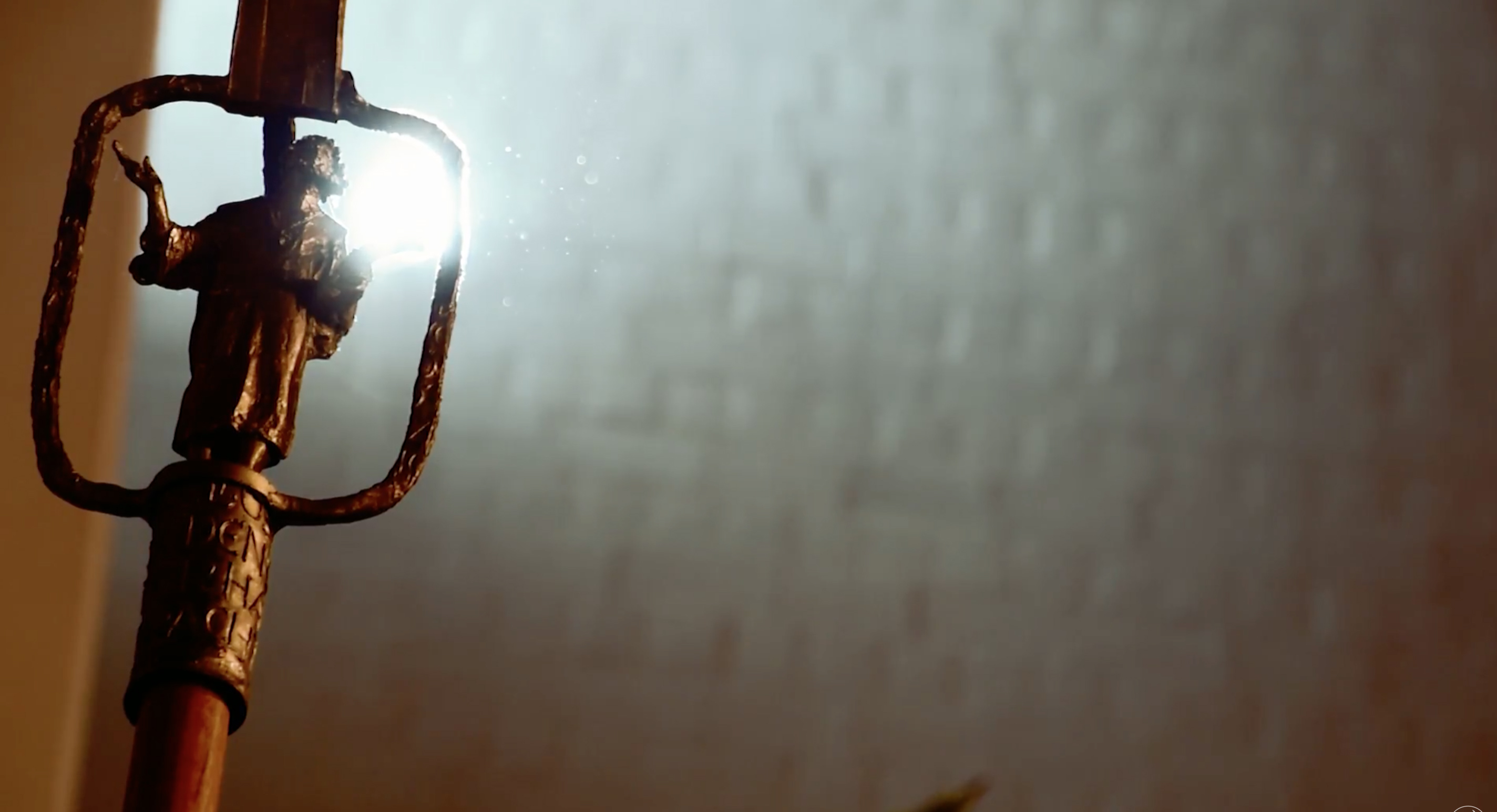 Dieses Bild zeigt die Benediktstatuette in St. Benedikt zu Regensburg im Strahl der Sonne. Dies ist an mehreren Tagen rund um den 11.Juli sowie um den 01.Juni der Fall.